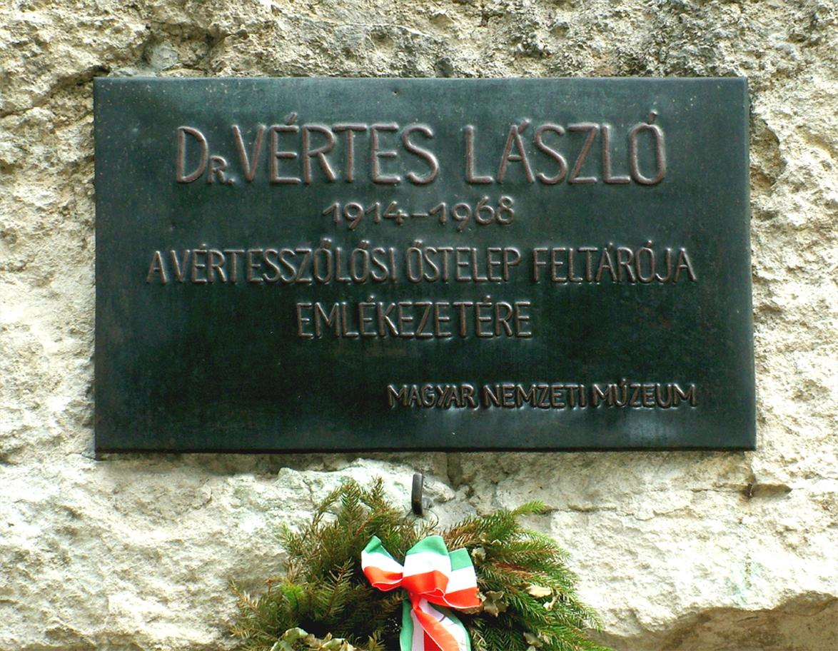 Ősembertelep Vértesszőlősön - Vértes László-emléktábla